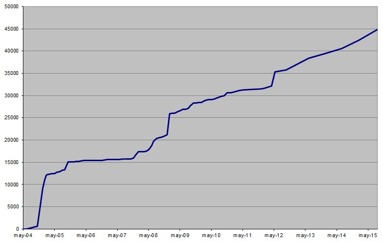 Crecemento do número de entradas no Galizionario